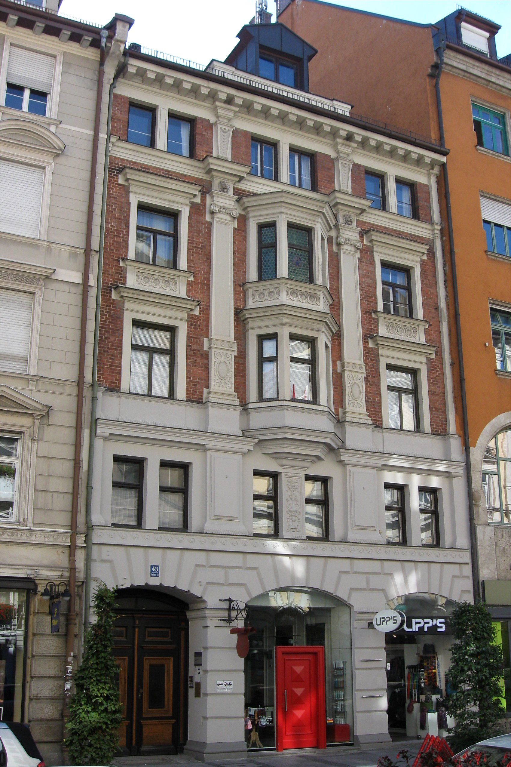 Sendlinger Straße 43; Geschäfts- und Mietshaus, fünfgeschossiger schmaler Neurenaissancebau mit reich gegliederter Klinkerfassade und polygonalem Mittelerker, von Oscar Strelin, 1884/85.